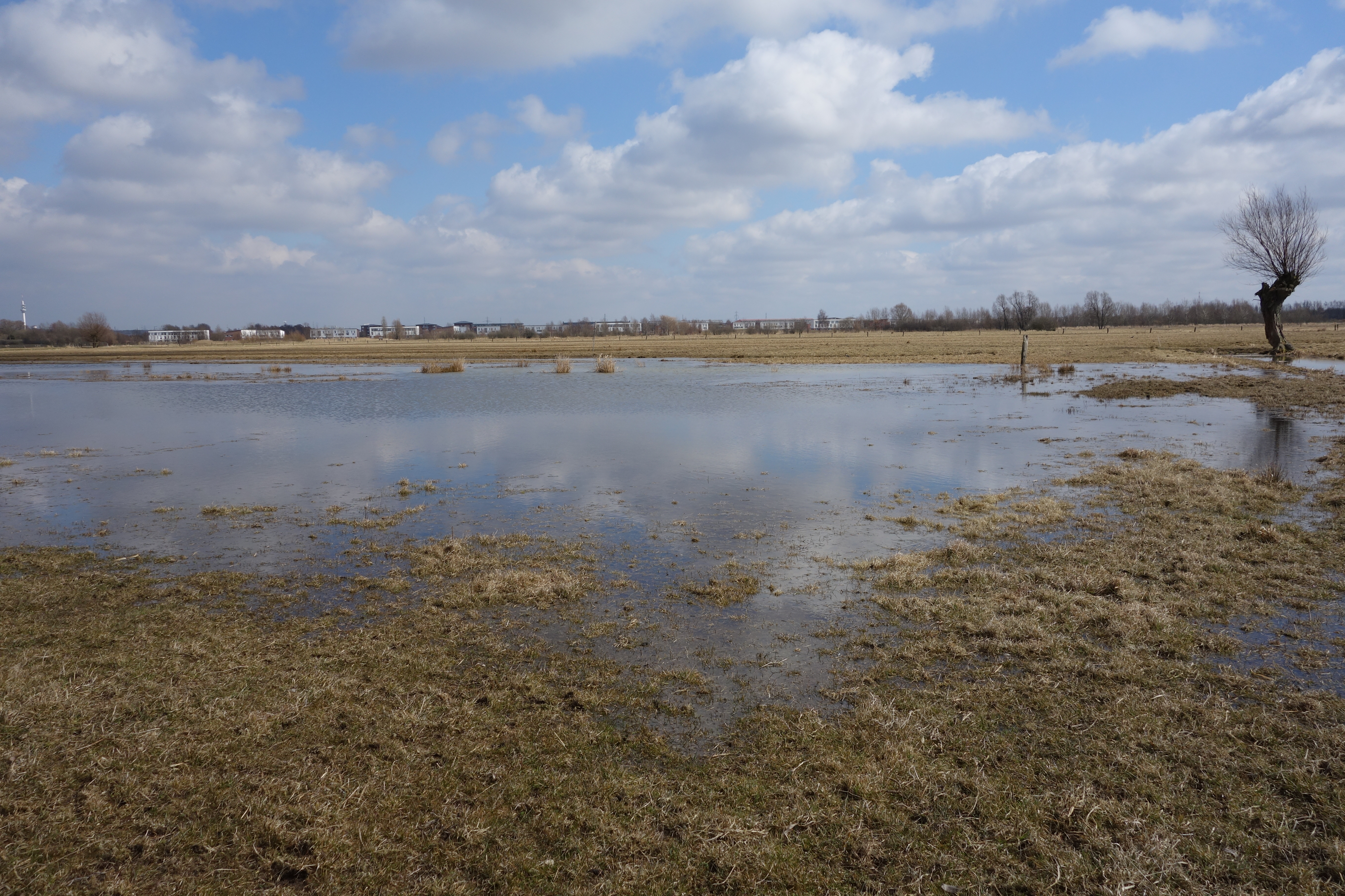 Deitsch: Überschwemmtes Grünland im Gebietszentrum